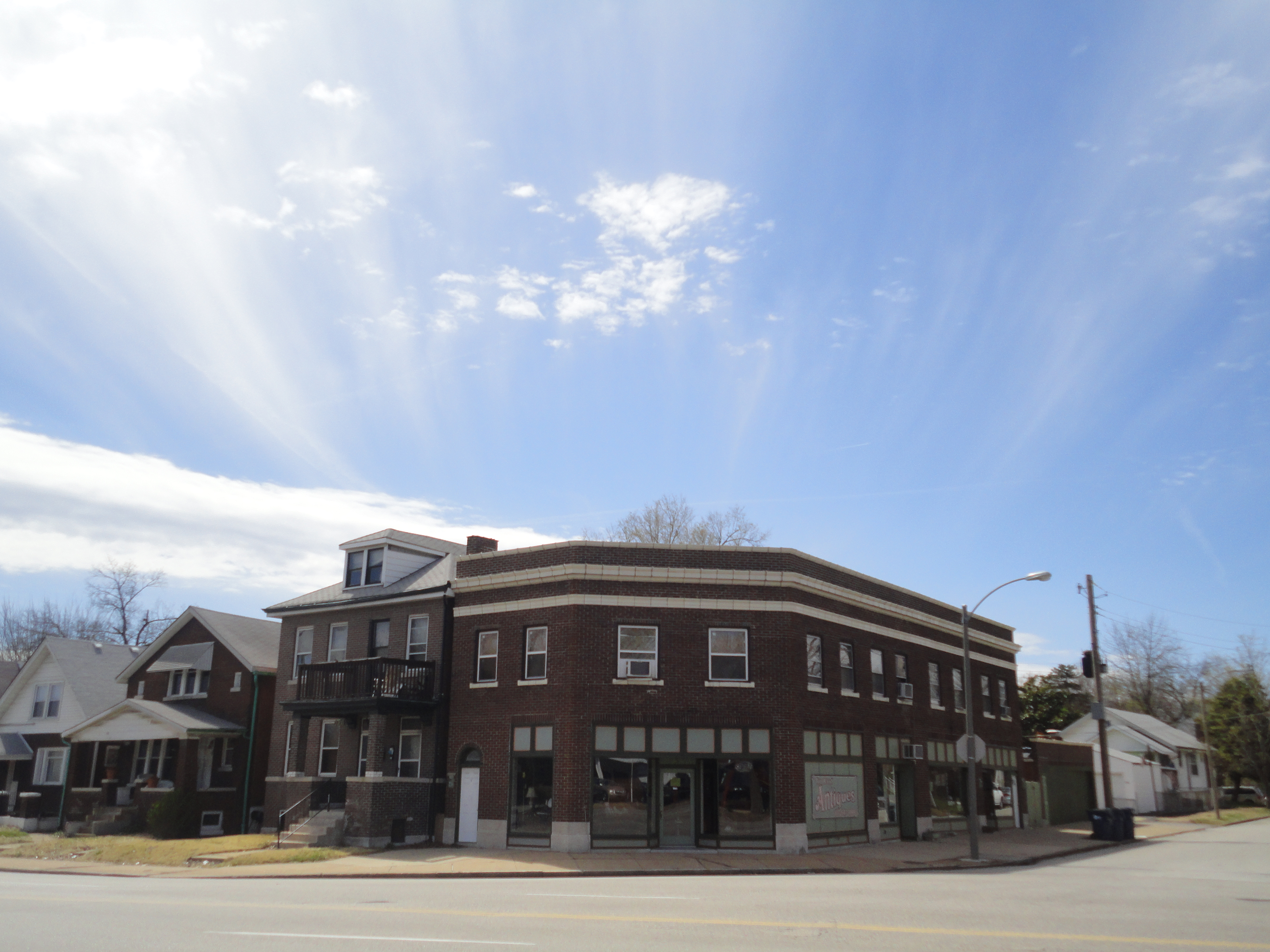 Antiques on McCausland